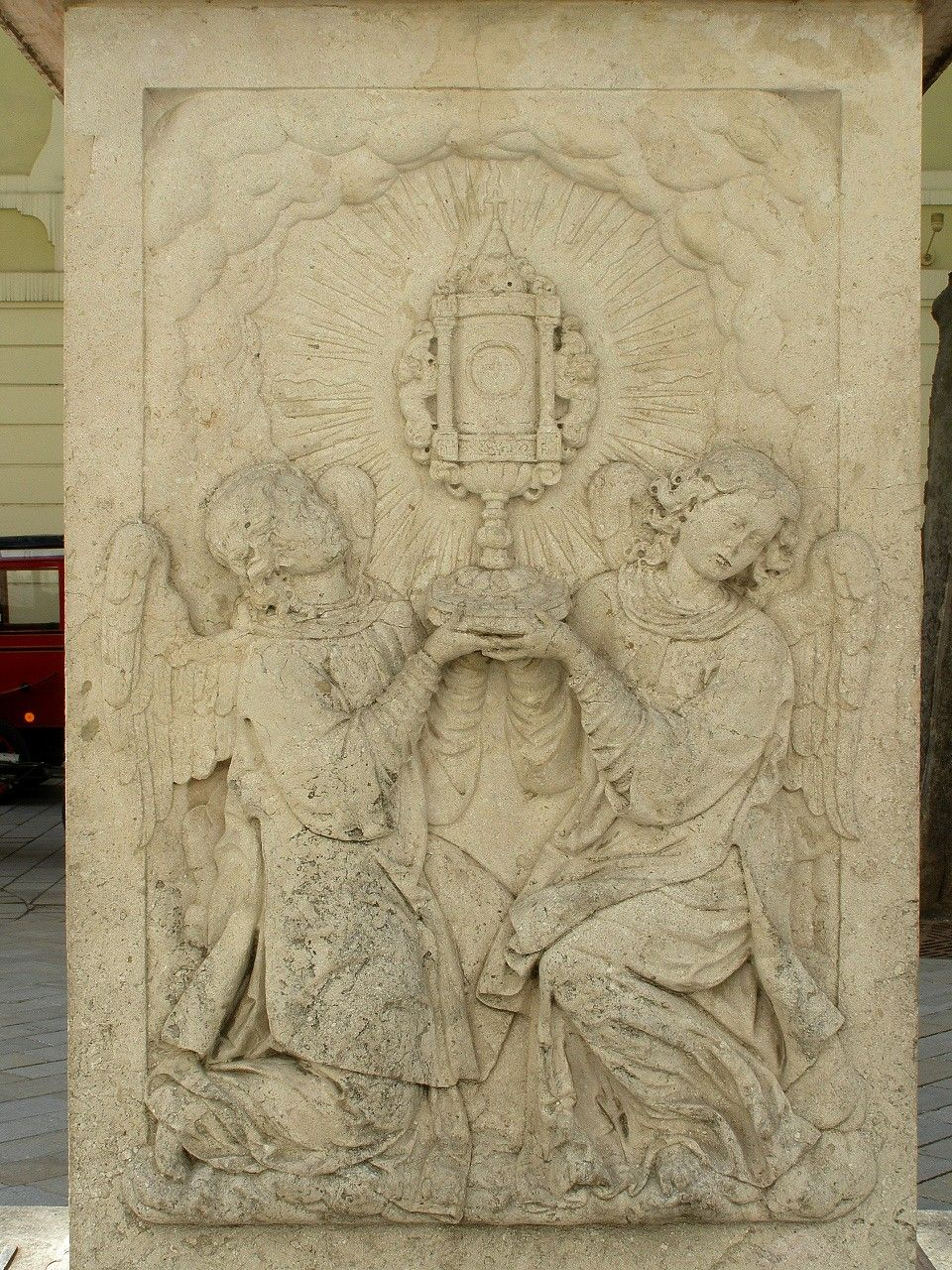 Adorácia hostie - reliéf monštrancie nesúcej dvojicou anjelov na čelnej ploche podstavca stĺpa This medium shows the protected monument with the number 101-26/0 in the Slovak Republic.